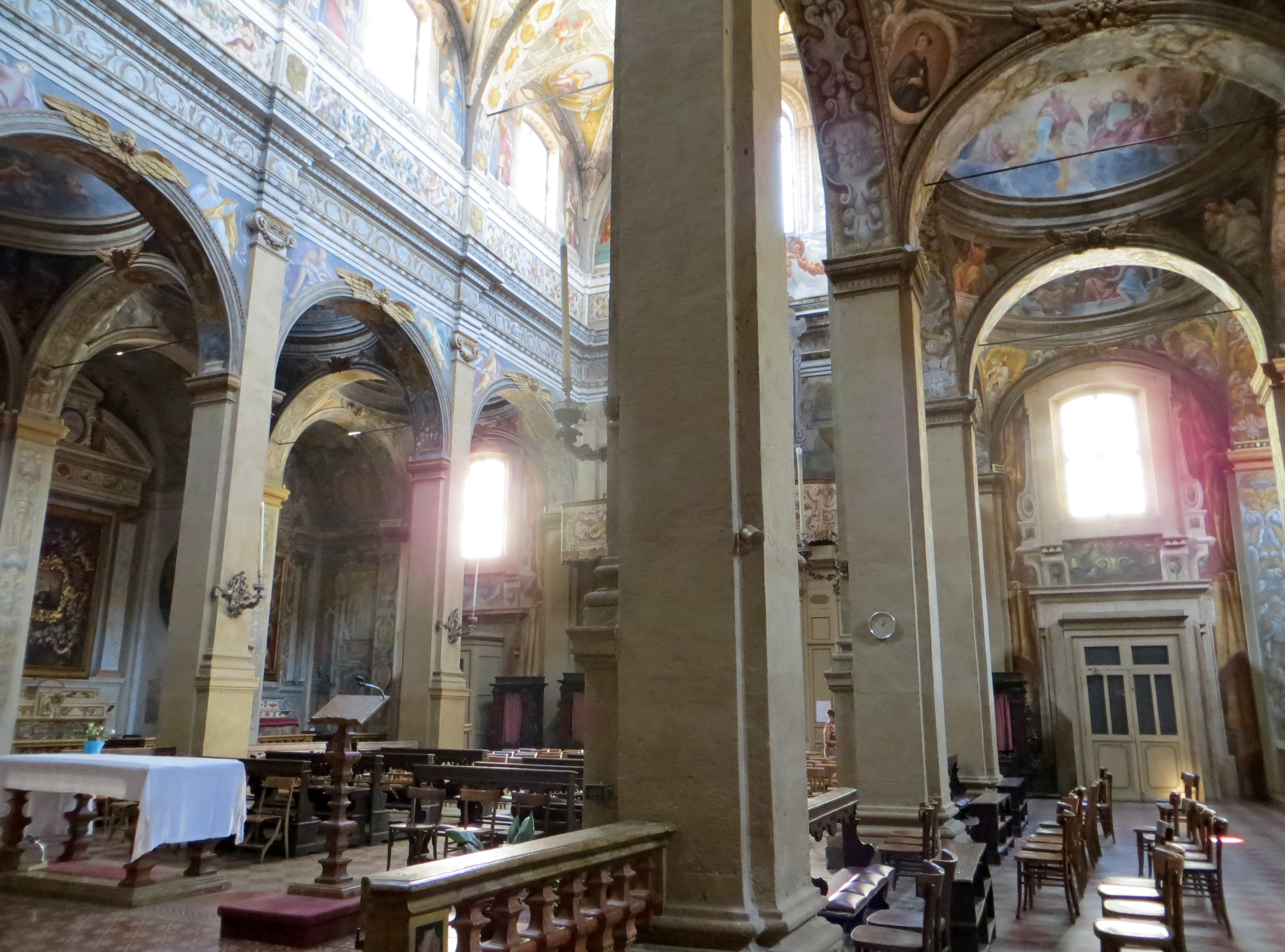 Chiesa di Santa Cristina (Parma) - navate